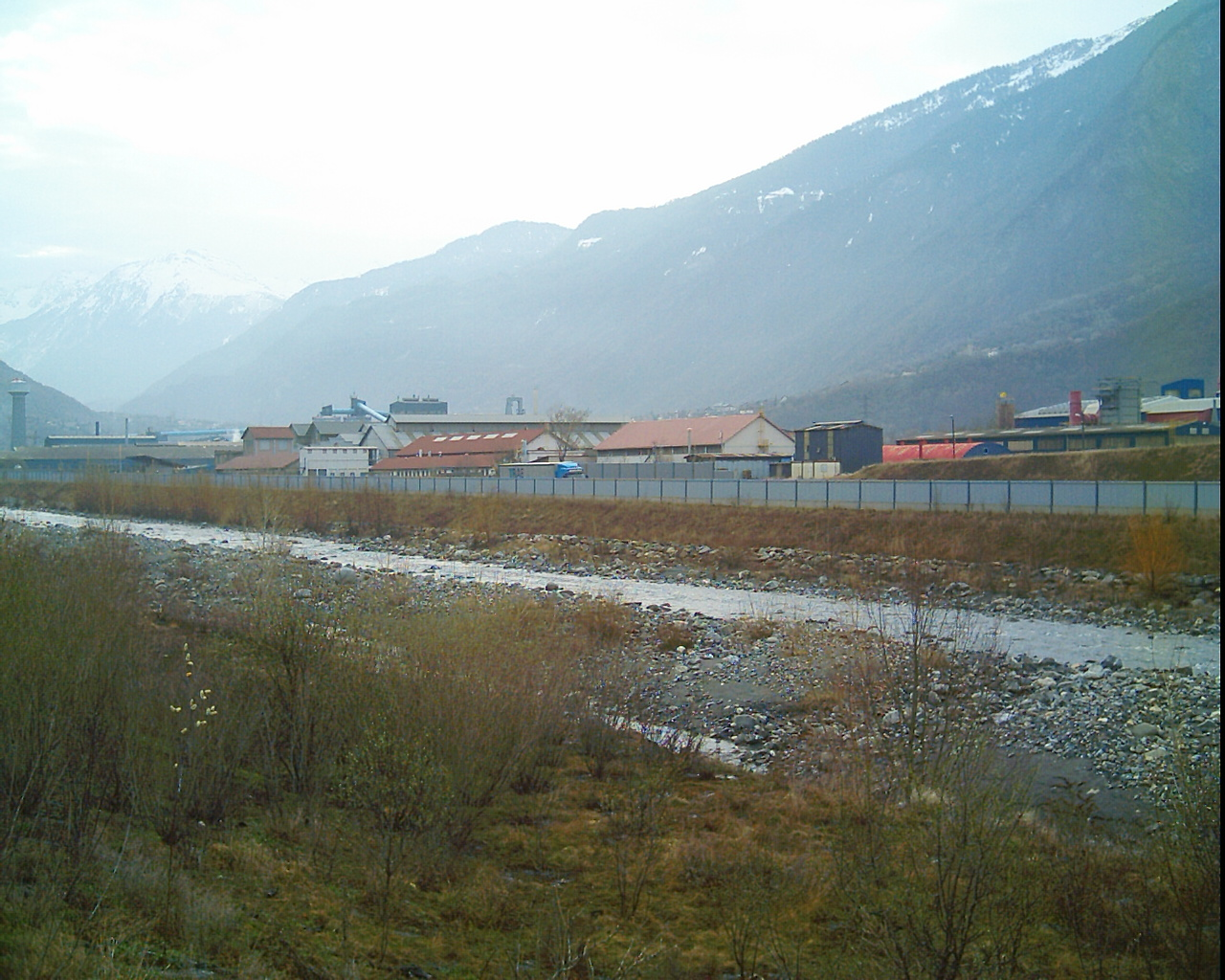 Vue de l'usine d'aluminium de St Jean de maurienne au bord de la rivière Arc en premier plan